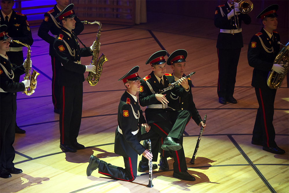 Orchester der Suworow Militärakademie Moskau am Tattoo on Stage 2012 im Konzertsaal des KKL Luzern